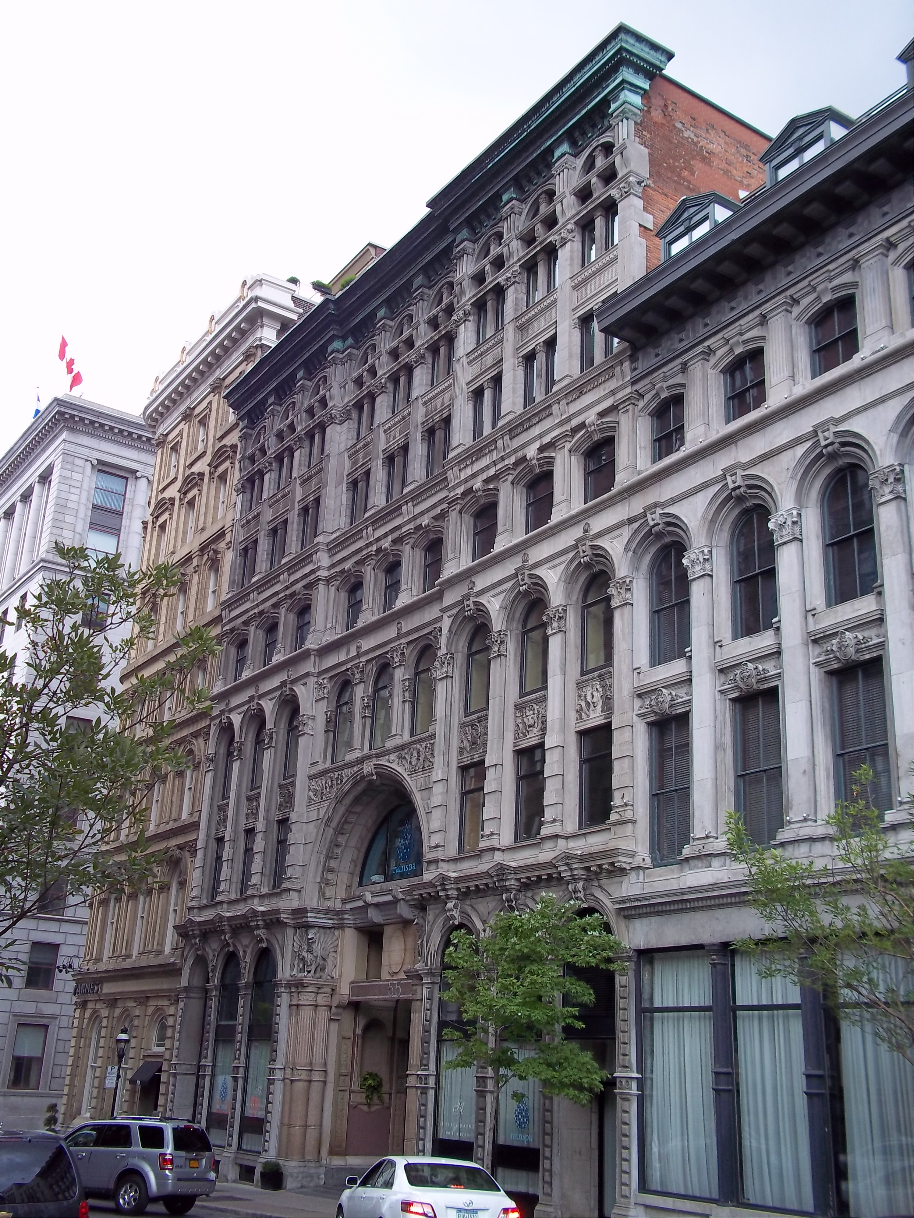 Banque du Peuple, 53-57, rue Saint-Jacques, Montréal info